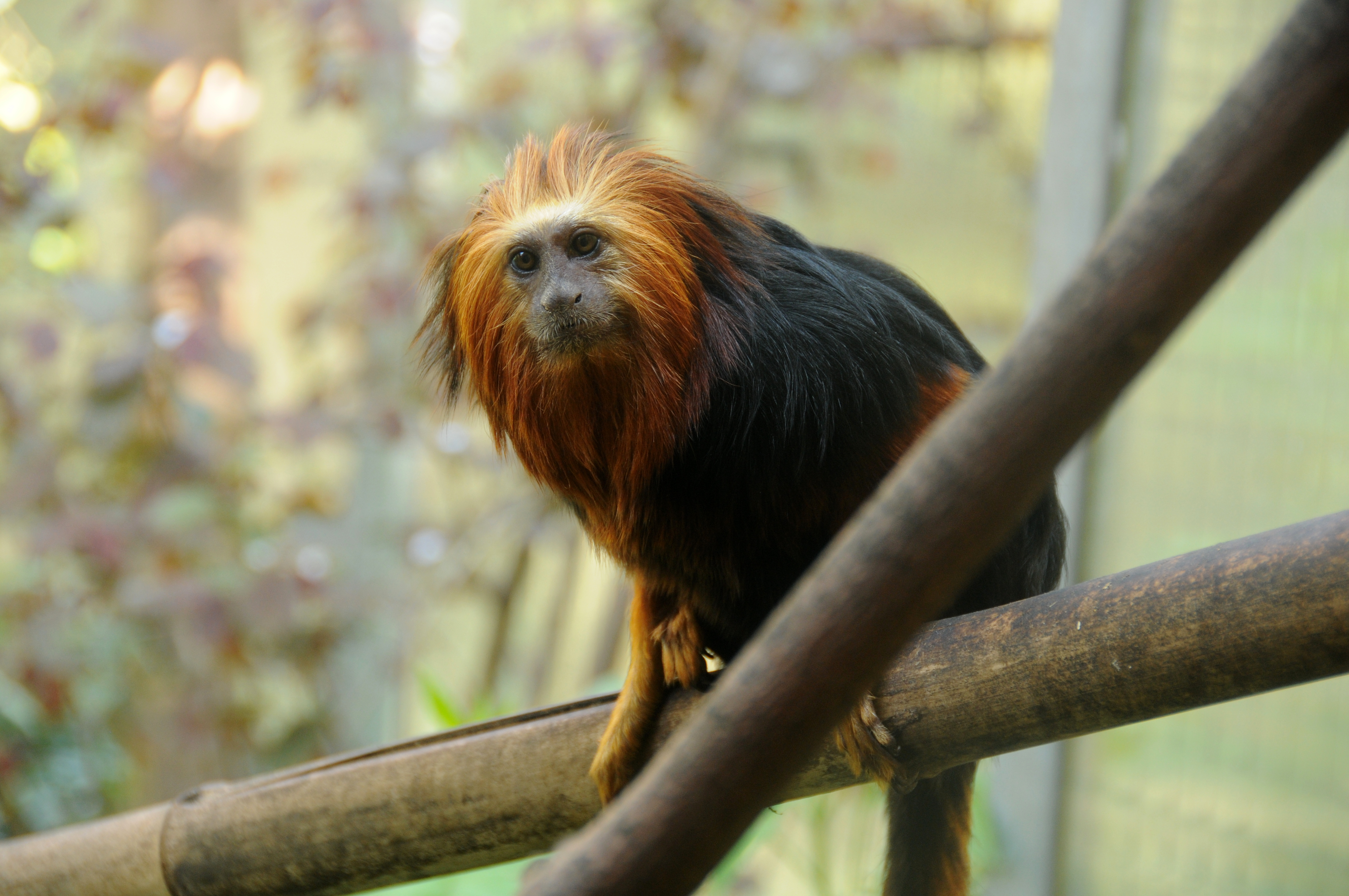 Tamarin lion à tête dorée (Leontopithecus chrysomelas)